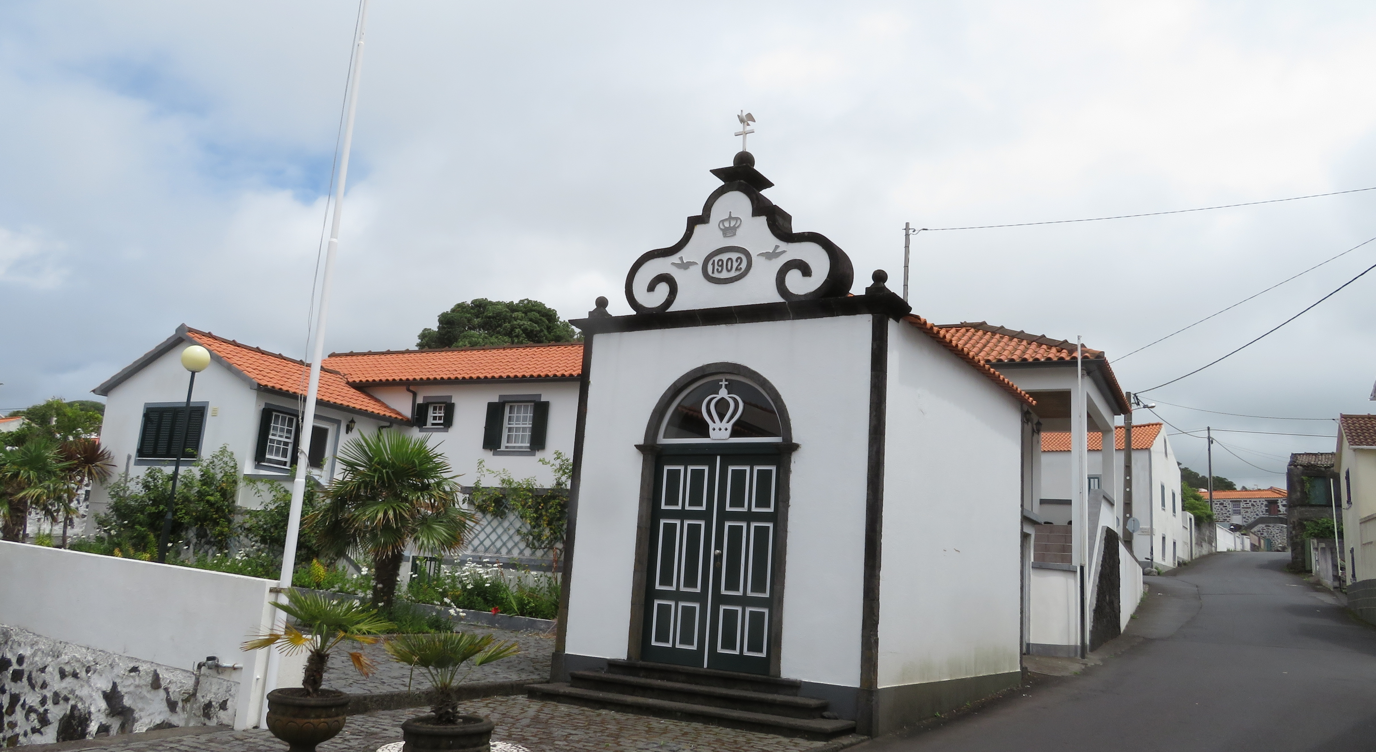 Império do Espírito Santo, Criação Velha, Ilha do Pico, Açores, Portugal